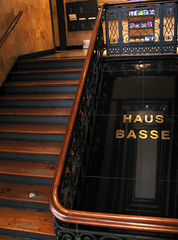 Blick vom ersten Treppenabsatz im Haus Basse mit den zum Gedenken offensichtlich bewußt belassenen Brandlöchern auf den hölzernen Treppenstiegen ...